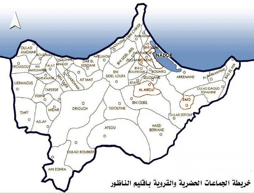 خريطة الجماعات الحضرية والقروية لاقليم الناظور